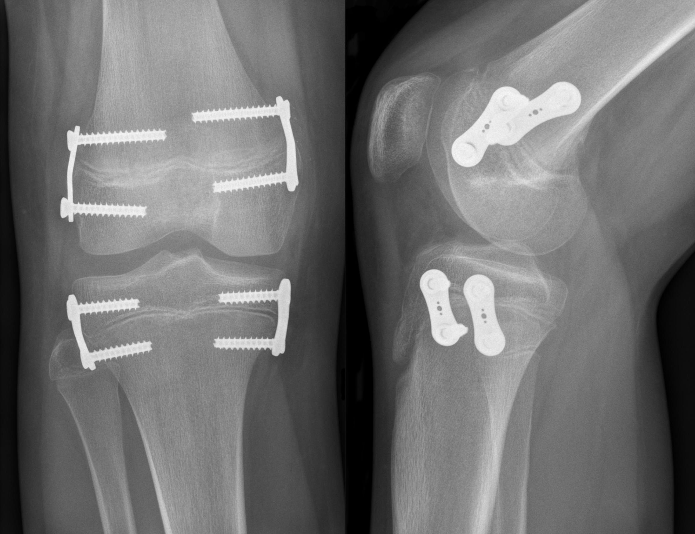 Femorale und tibiale Epiphyseodese zur Korrektur einer relevanten Beinlängendifferenz bei einem ca. 13 jährigen Menschen mit speziellen Zweilochplatten (eight-Plate).